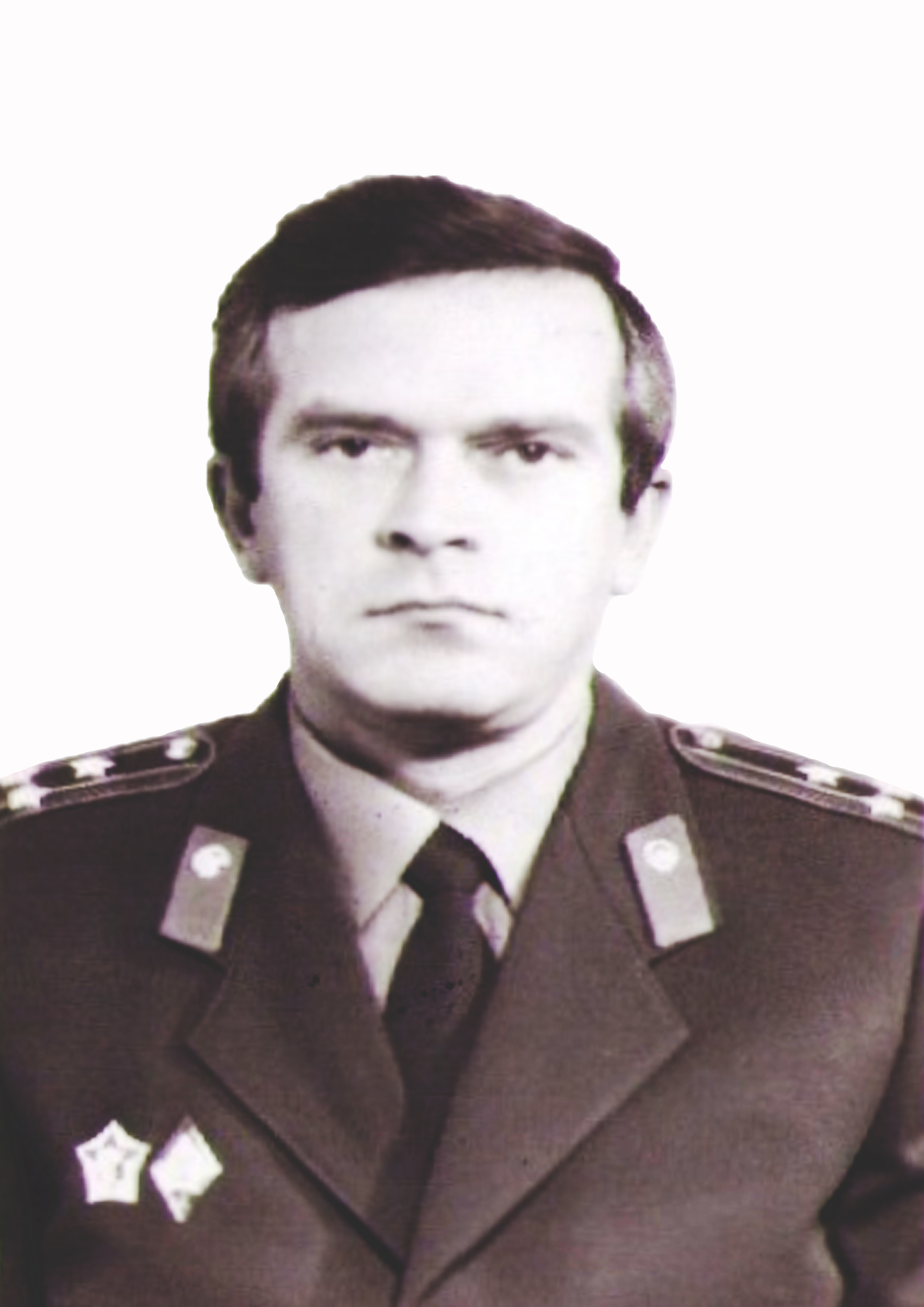 первый командир отряда милиции особого назначения